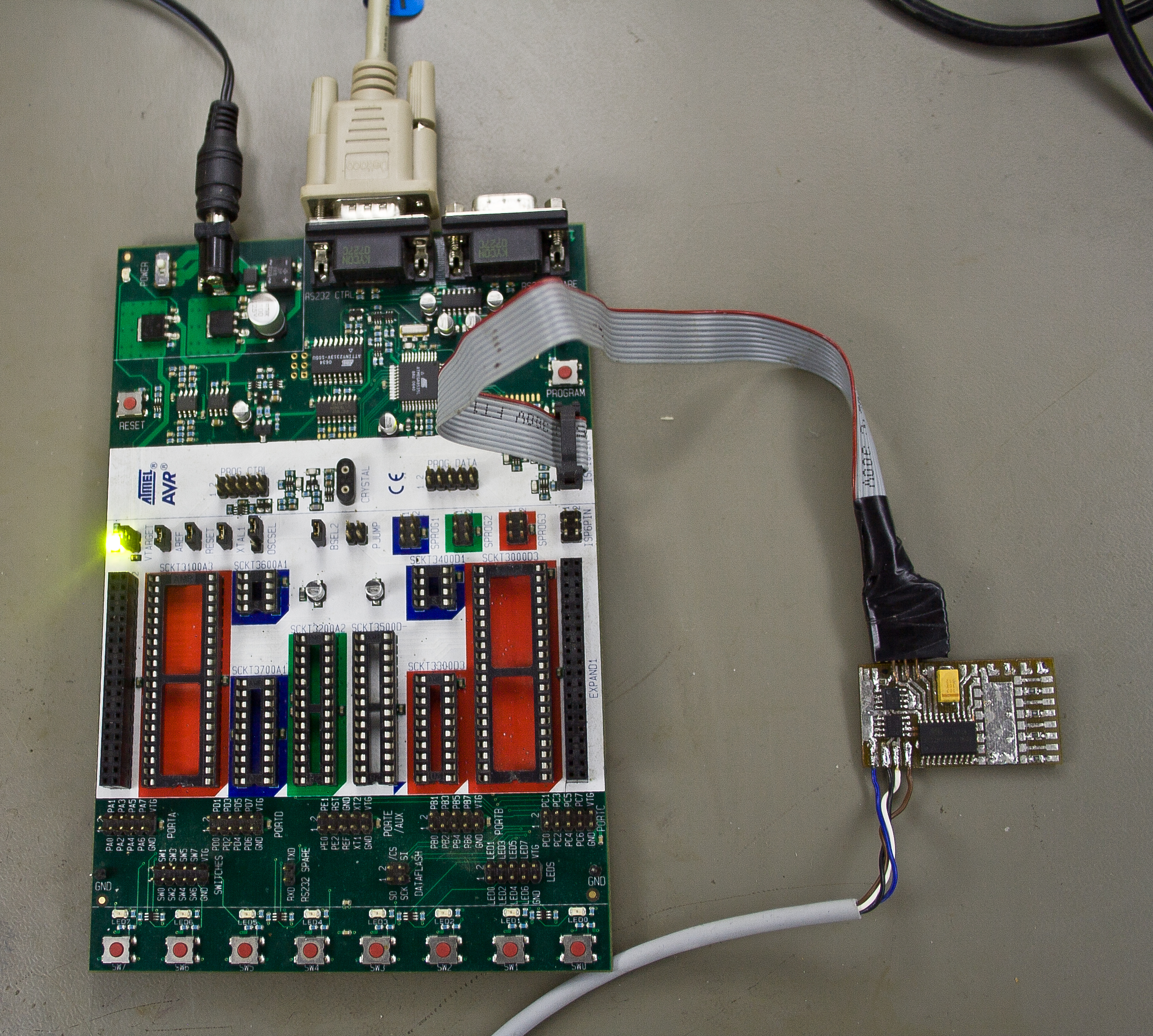 Atmel AVR mikrokontrollerite arenduslaud STK500, mis on ühenduses lauaarvutiga.